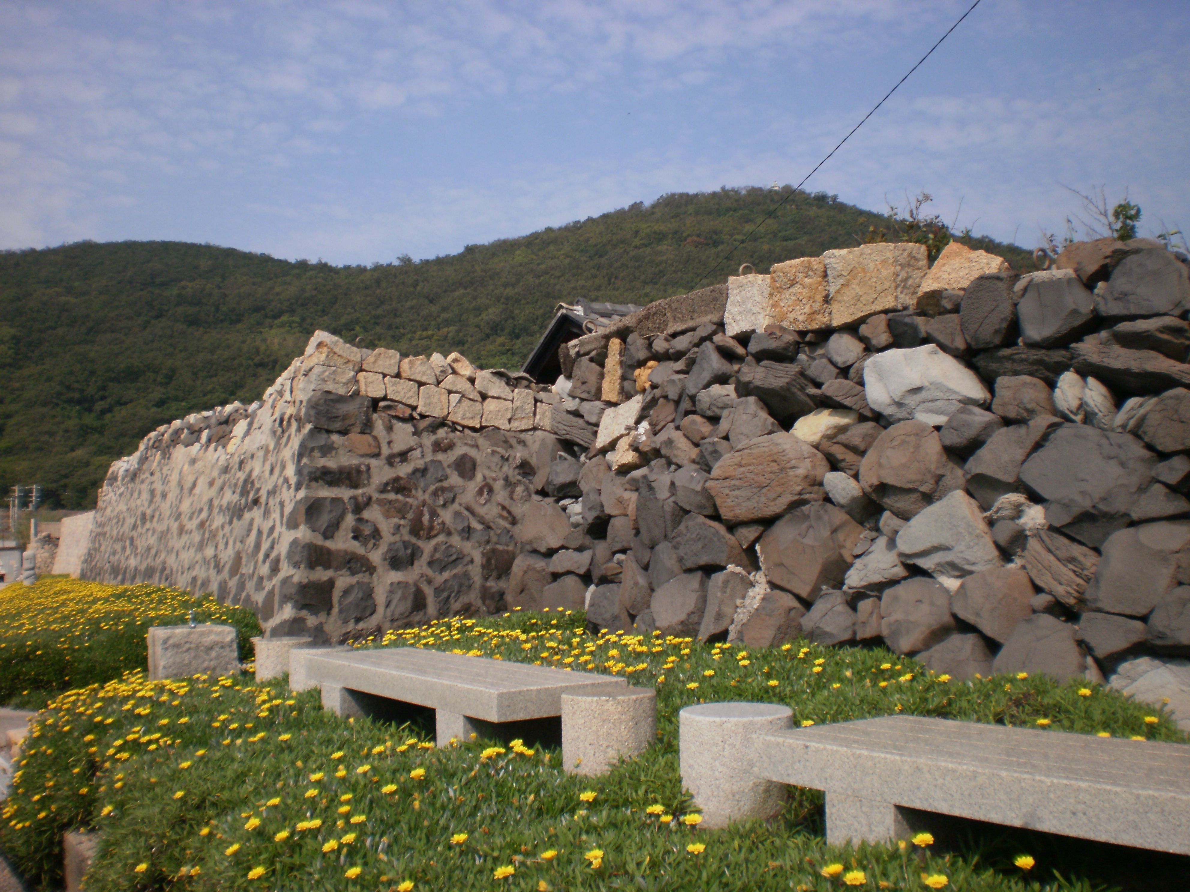 女木島 001